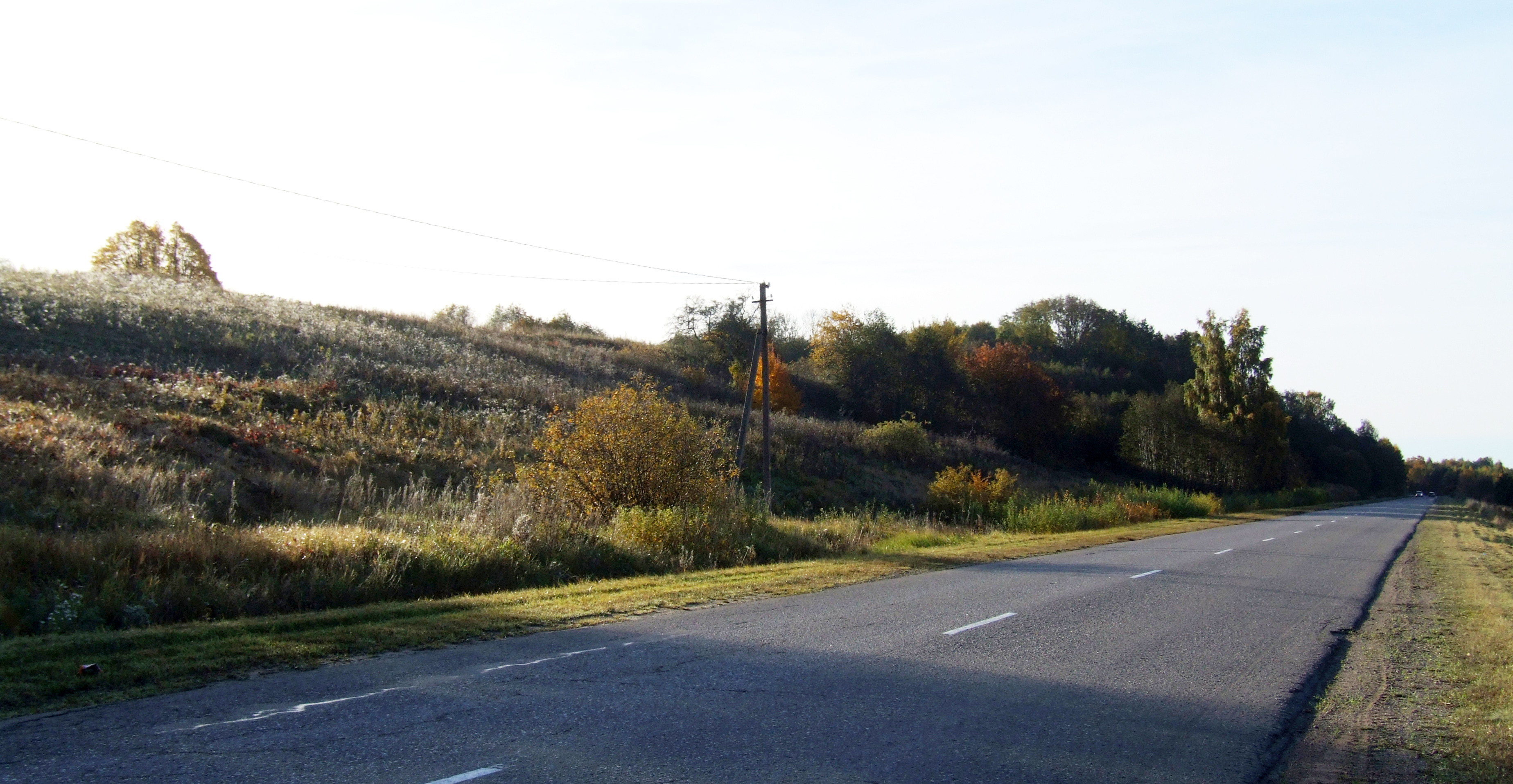 Baltijas ledus ezera senkrasts, 12.10.2013.